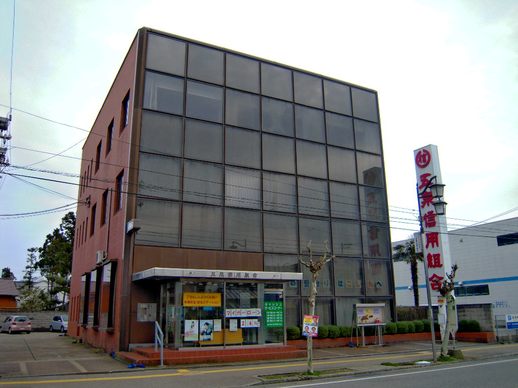 五泉信用組合本店